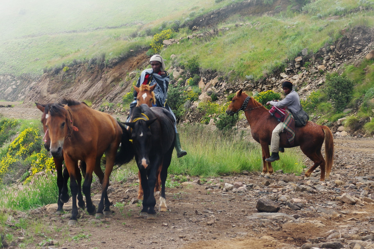 Basotho Reiter auf der Straße zum Sanipass